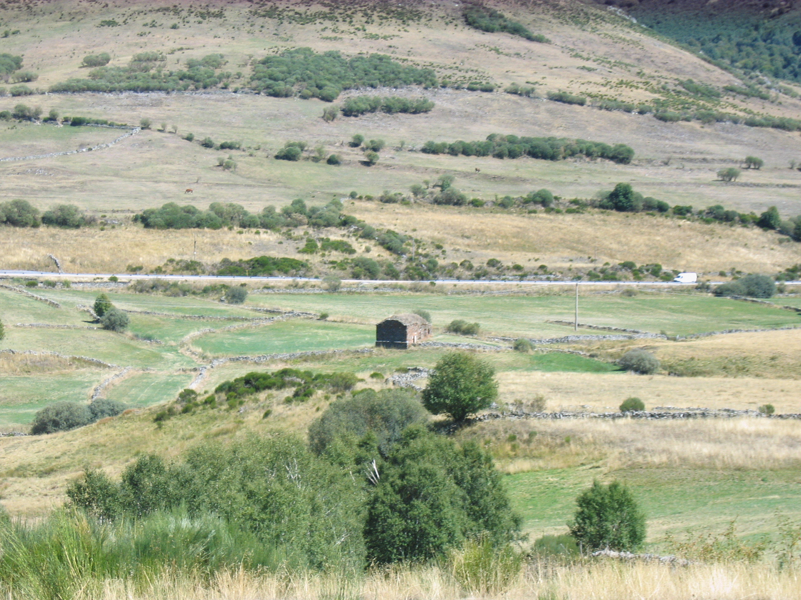 Puerto de la Magdalena, León, España